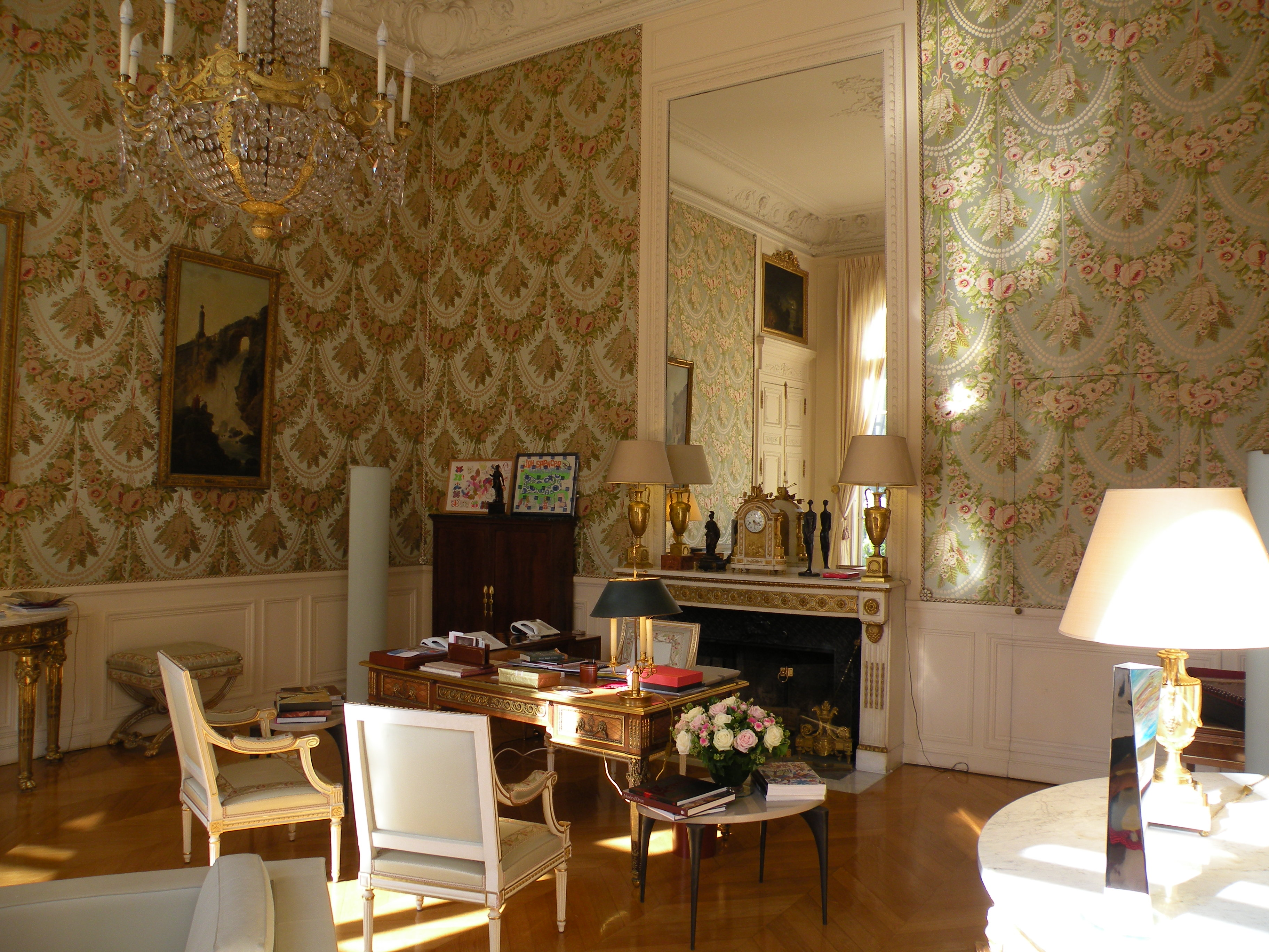 salon bleu bureau de carla sarkozy